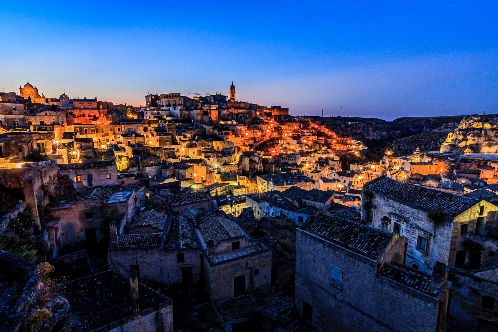 Veduta dal Belvedere Piazzetta Pascoli, compresa tra la Cattedrale ed il sasso Caveoso